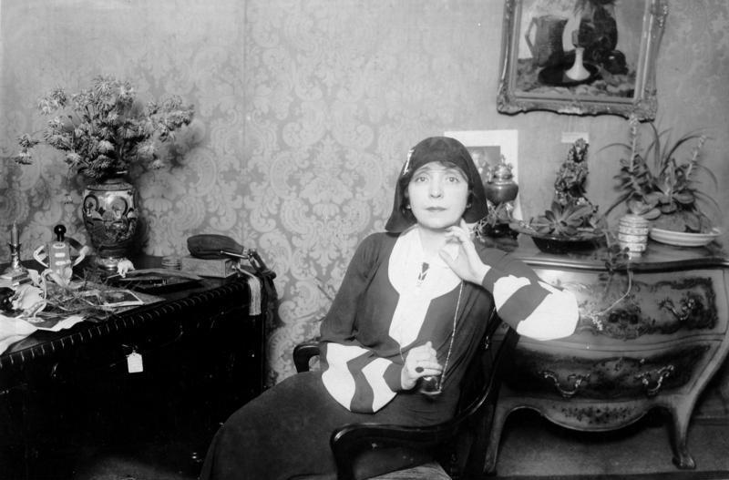 Fritzy Massary Fritzy Massary in dem von ihr anlässlich der Ausstellung "Weltkultur durch Frauenhand" im Möbelhaus Gleiser arrangierten Zimmer. (Aufn.: 1929) Abgebildete Personen: Massary, Fritzi: Operettensängerin, Österreich (GND 118731572)